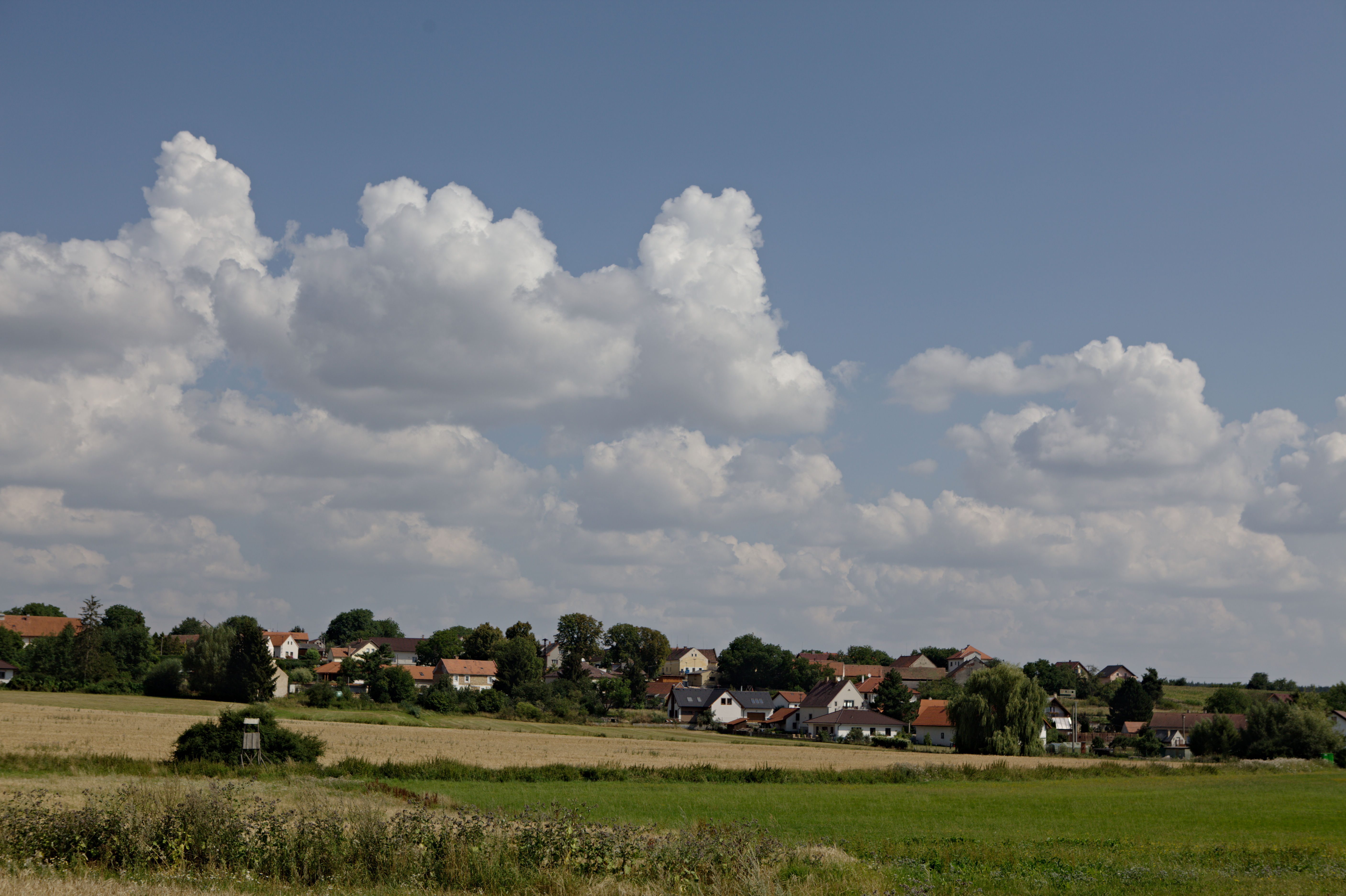 Žilov, pohled z jihu